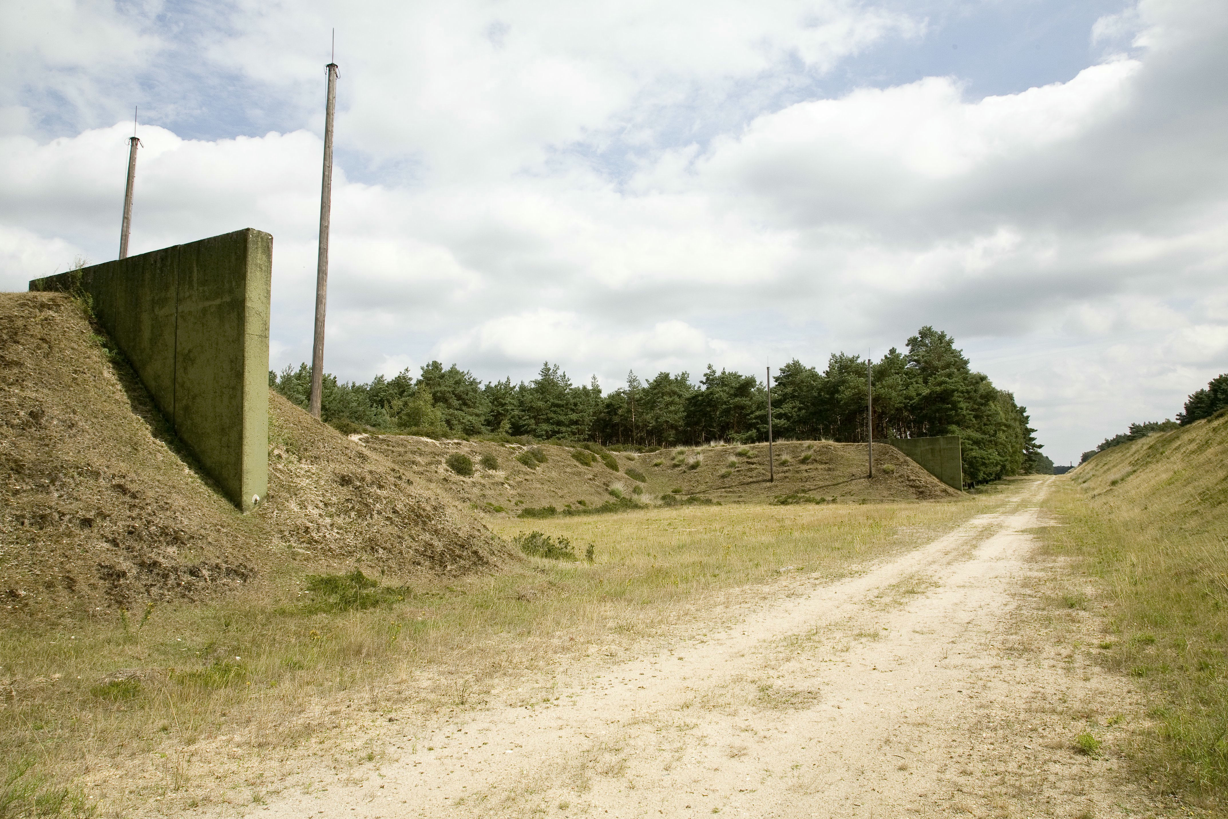 Zicht op splitterwallen tussen munitieloodsen, op tereein van verlaten munitiedepot, bij Brachterwald (opmerking: Publicatie: TRAP Brüggen, een cultuurhistorische fietstocht)